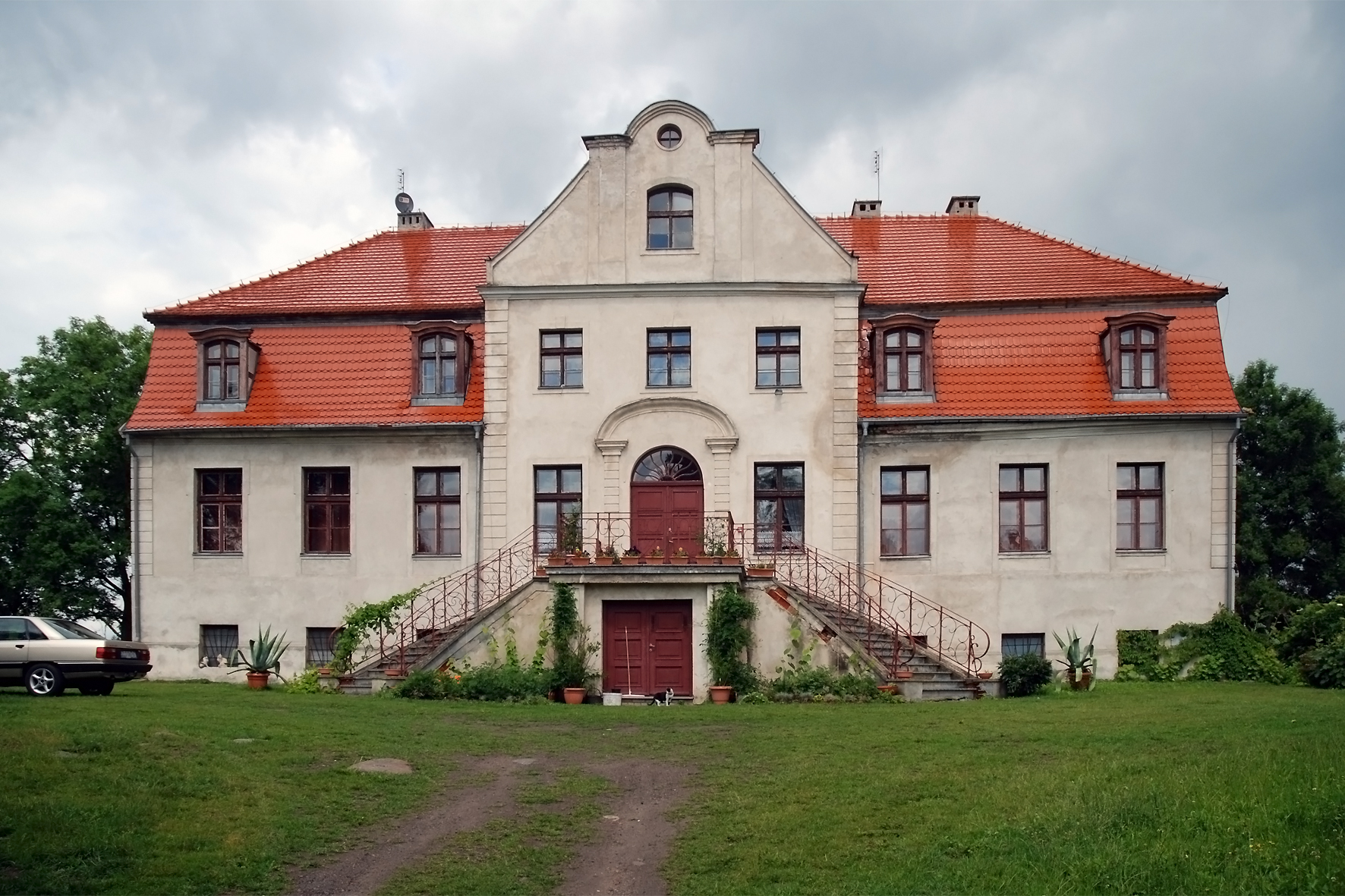 Strzmiele - dwór (zabytek nr rejestr. 92)